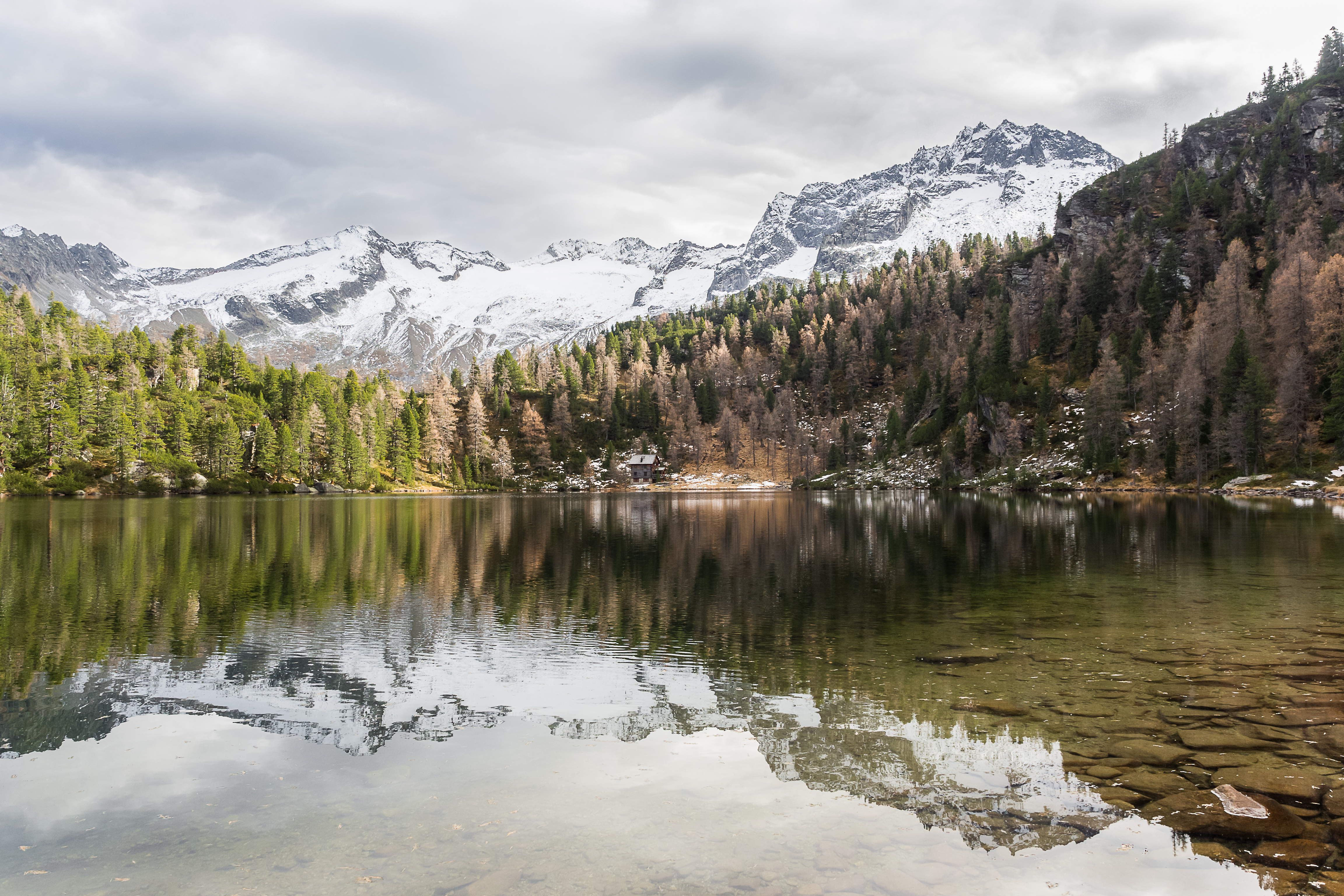 Hohe Tauern This file shows the National Park Hohe Tauern in Austria.